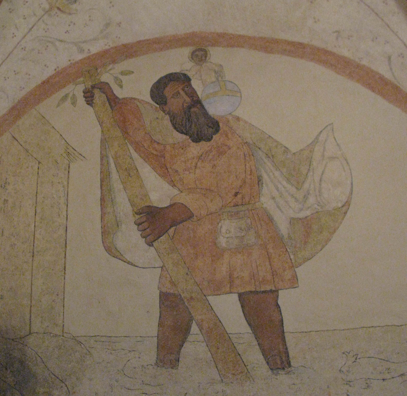 Wandmalerei des heiligen Christophorus in der Sakristei der Sankt Stephanus Kirche in Roitzheim.